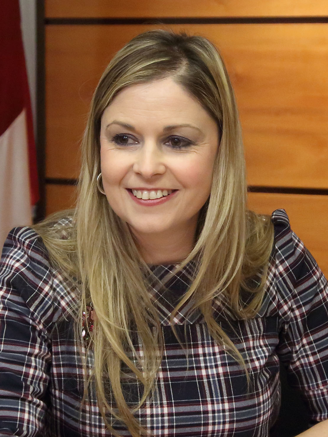 Toledo, 2-03-2017.- La consejera de Fomento del Gobierno regional, Elena de la Cruz, comparece en la Comisión de Economía y Presupuestos de las Cortes de Castilla-La Mancha para explicar los presupuestos de la Consejería para 2017. (Foto: Álvaro Ruiz // JCCM)